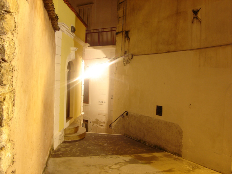 Vicolo Rione Iunno a Mattinata (FG) di sera